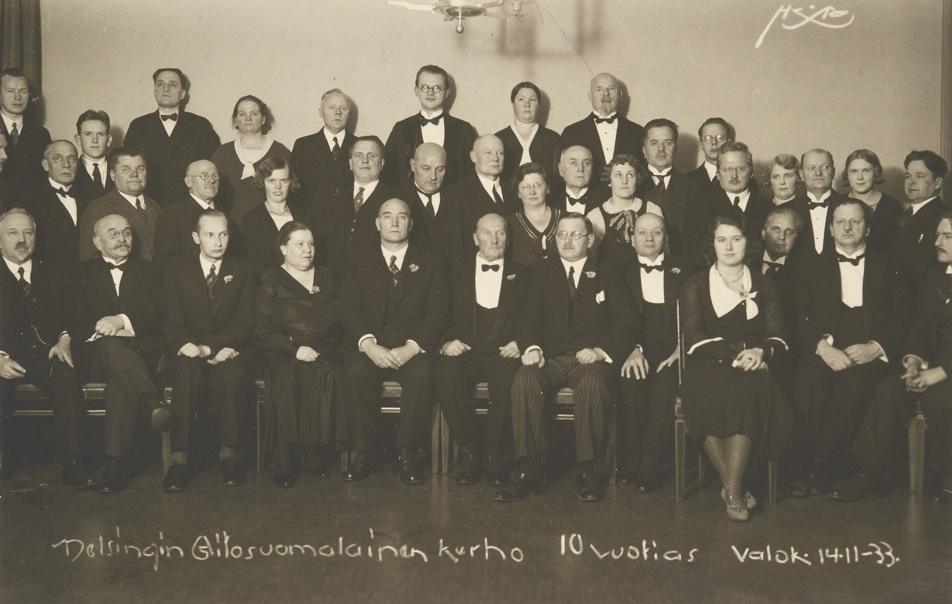 Helsingin aitosuomalaisen kerhon 10-vuotisjuhla 14.11.1933.